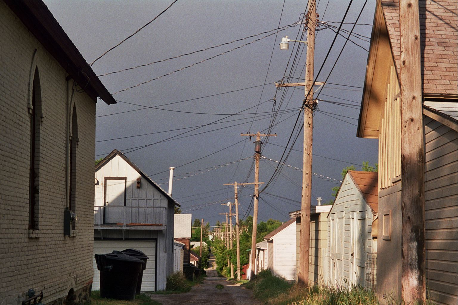 Alley in Helena, Montana, USA